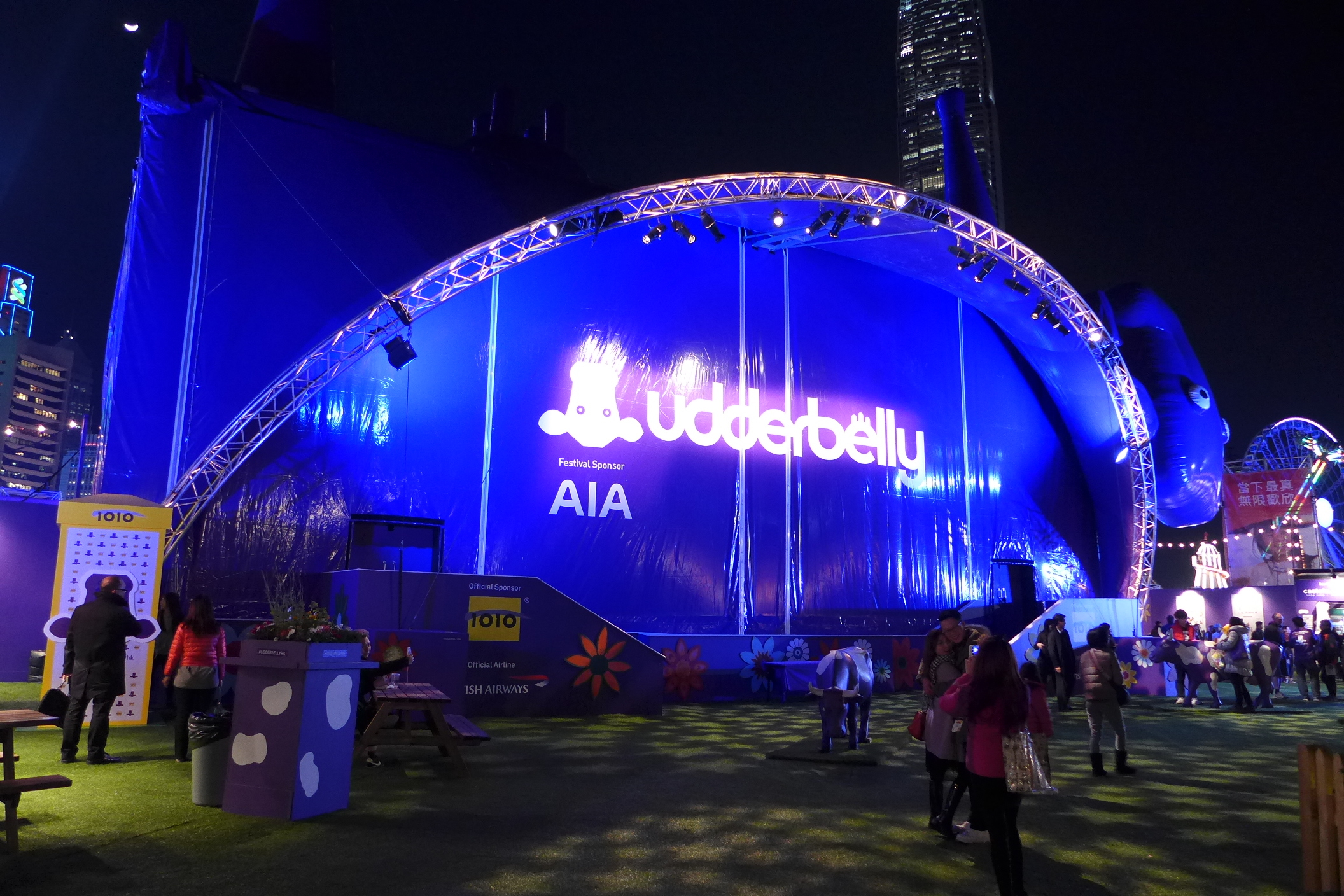 Uddberbelly Hong Kong